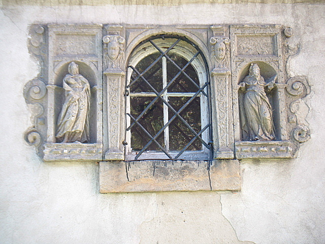 Kostel Narození P. Marie (Benešov nad Ploučnicí), Benešov nad Ploučnicí